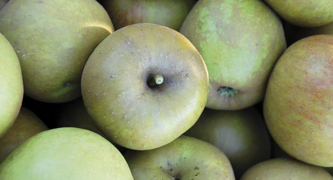 Errezil sagarrak